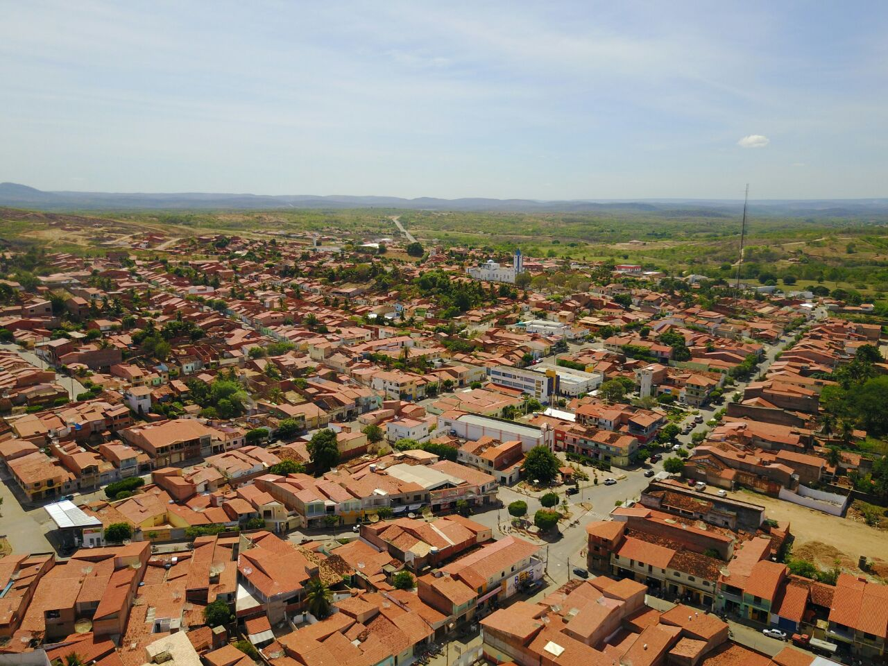 Imagem aérea da cidade de Farias Brito